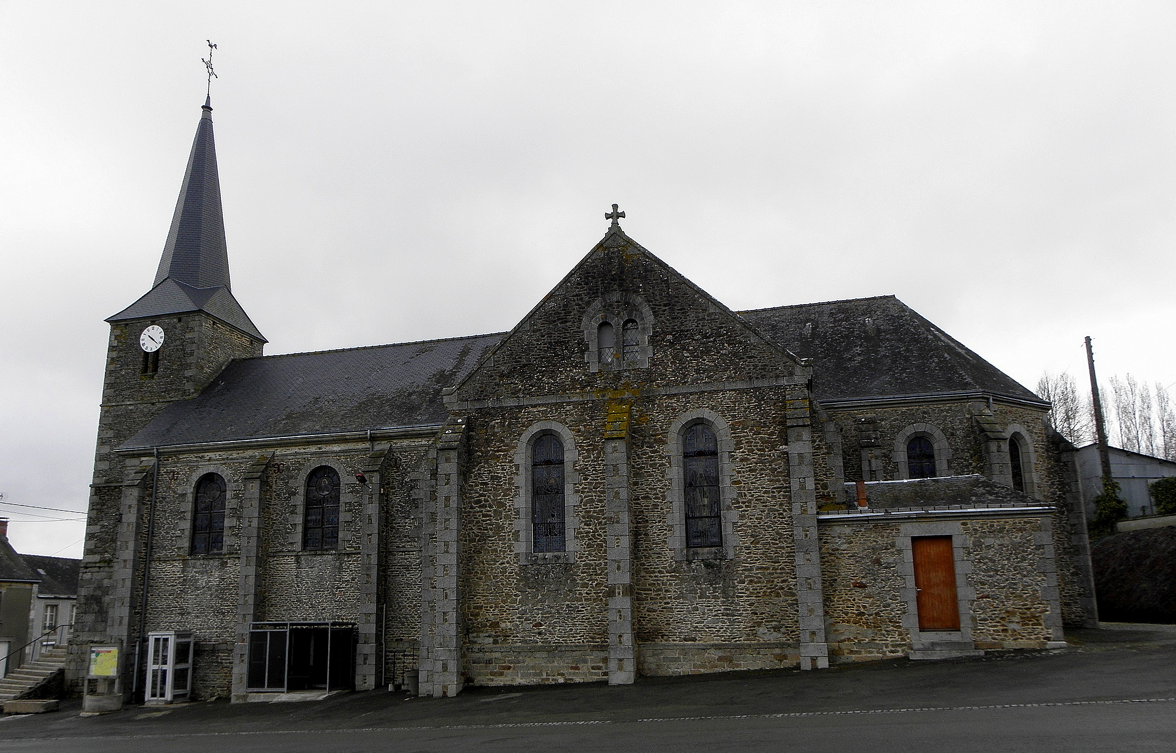 Église Saint-Pierre d'Hardanges (53). Vue méridionale.